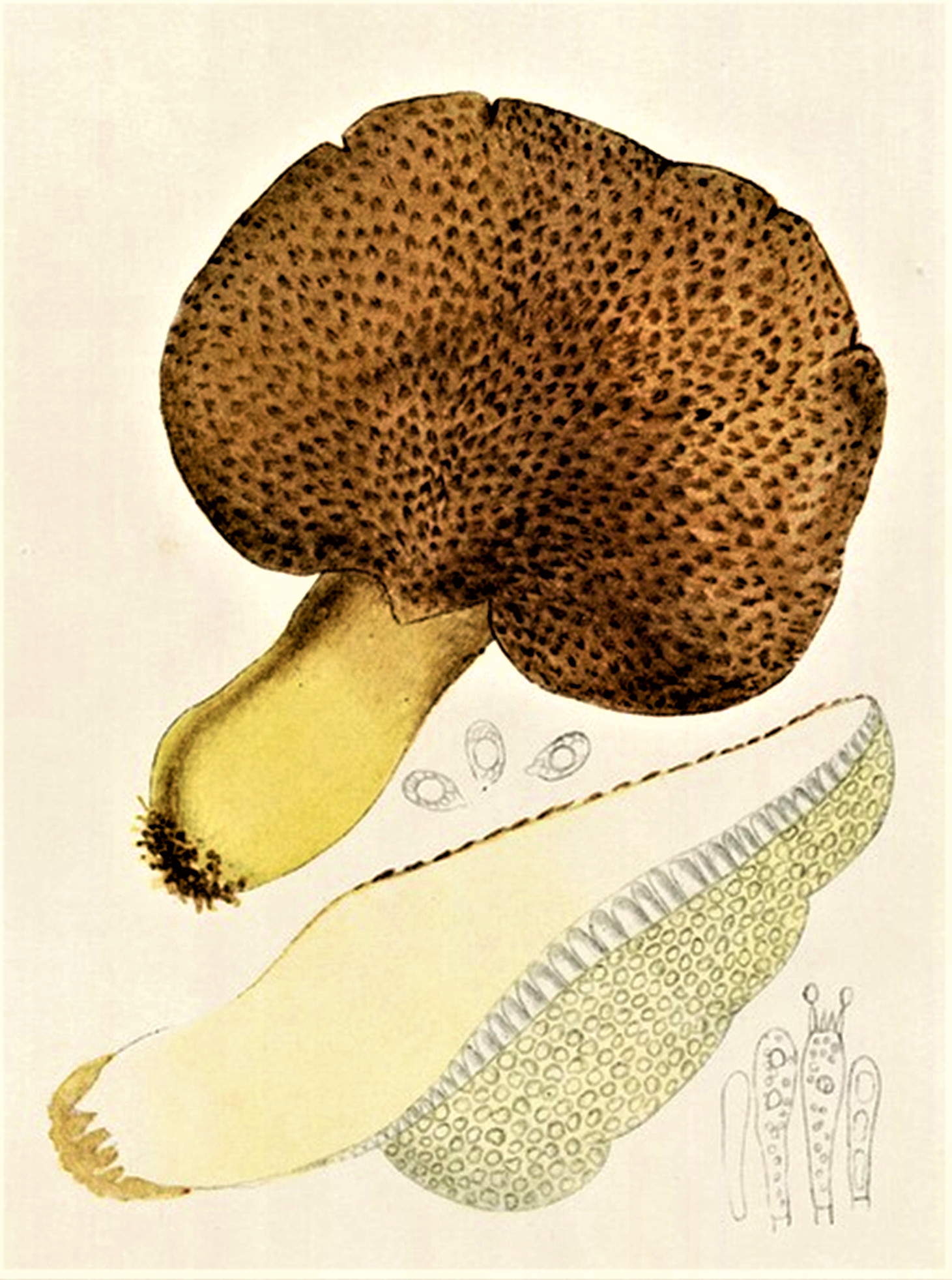 Giacomo Bresadola: Polyporus scobinaceus (Cum., 1805) Bres. (1931), heute Albatrellus pes-caprae (Pers., 1818) Pouzar (1966) oder Scutiger pes-caprae Bondartsev & Singer (1941)